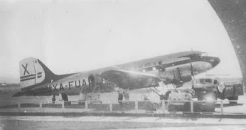 DC-3 de LAMSA en Torreón, Coah